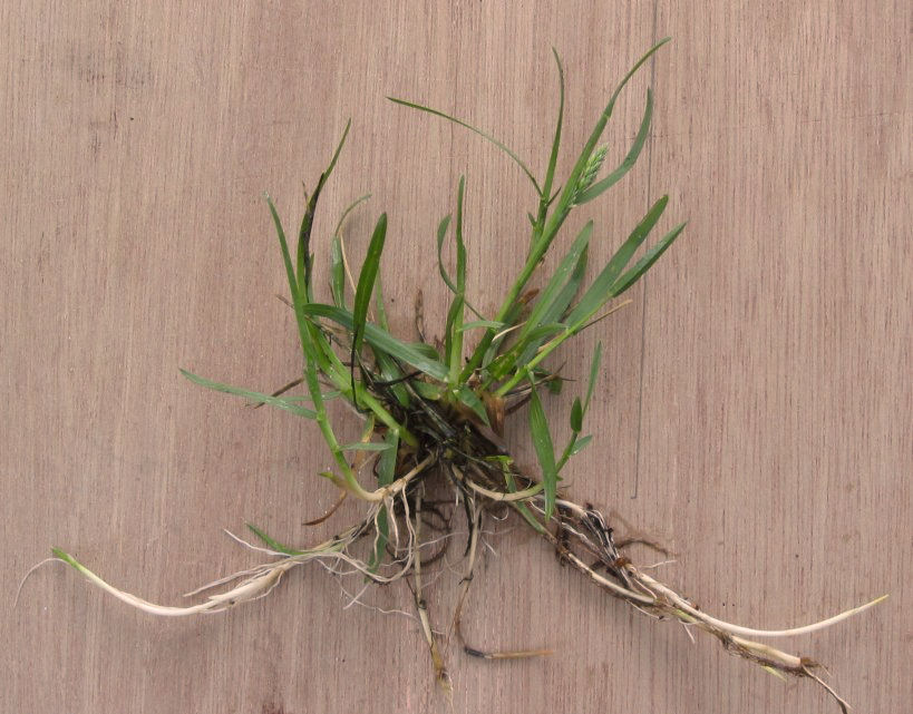 (Veldbeemdgras) Poa pratensis